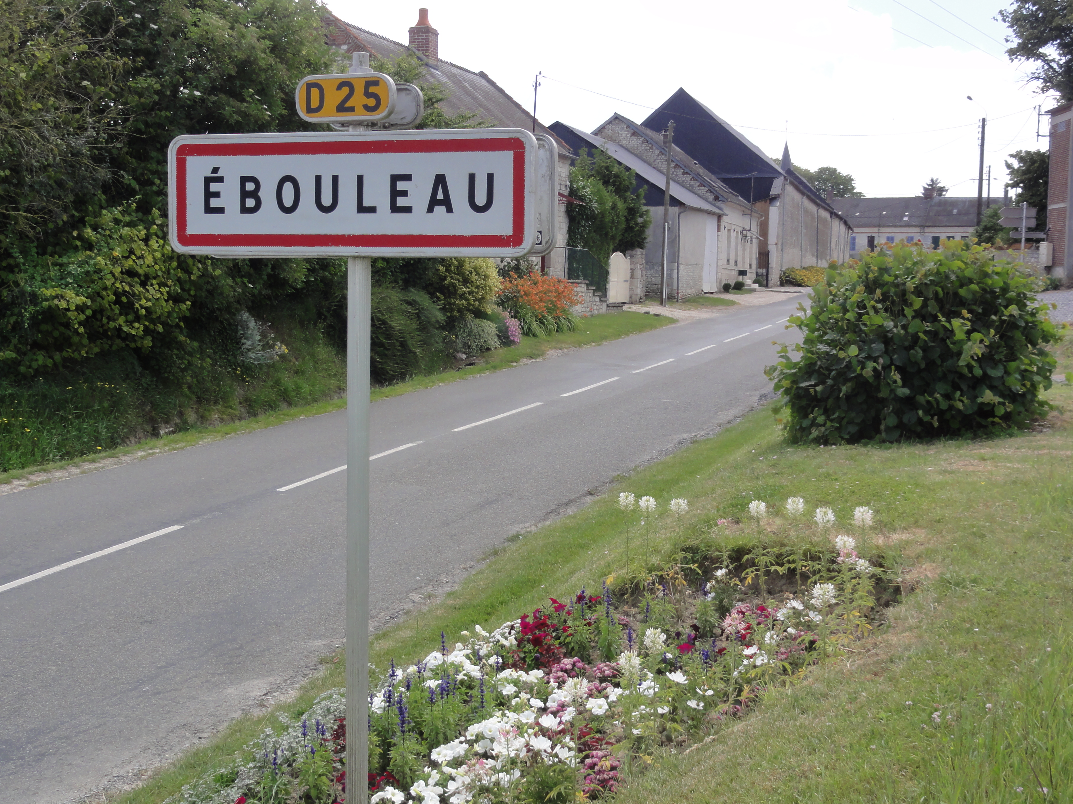 Ébouleau (Aisne) city limit sign